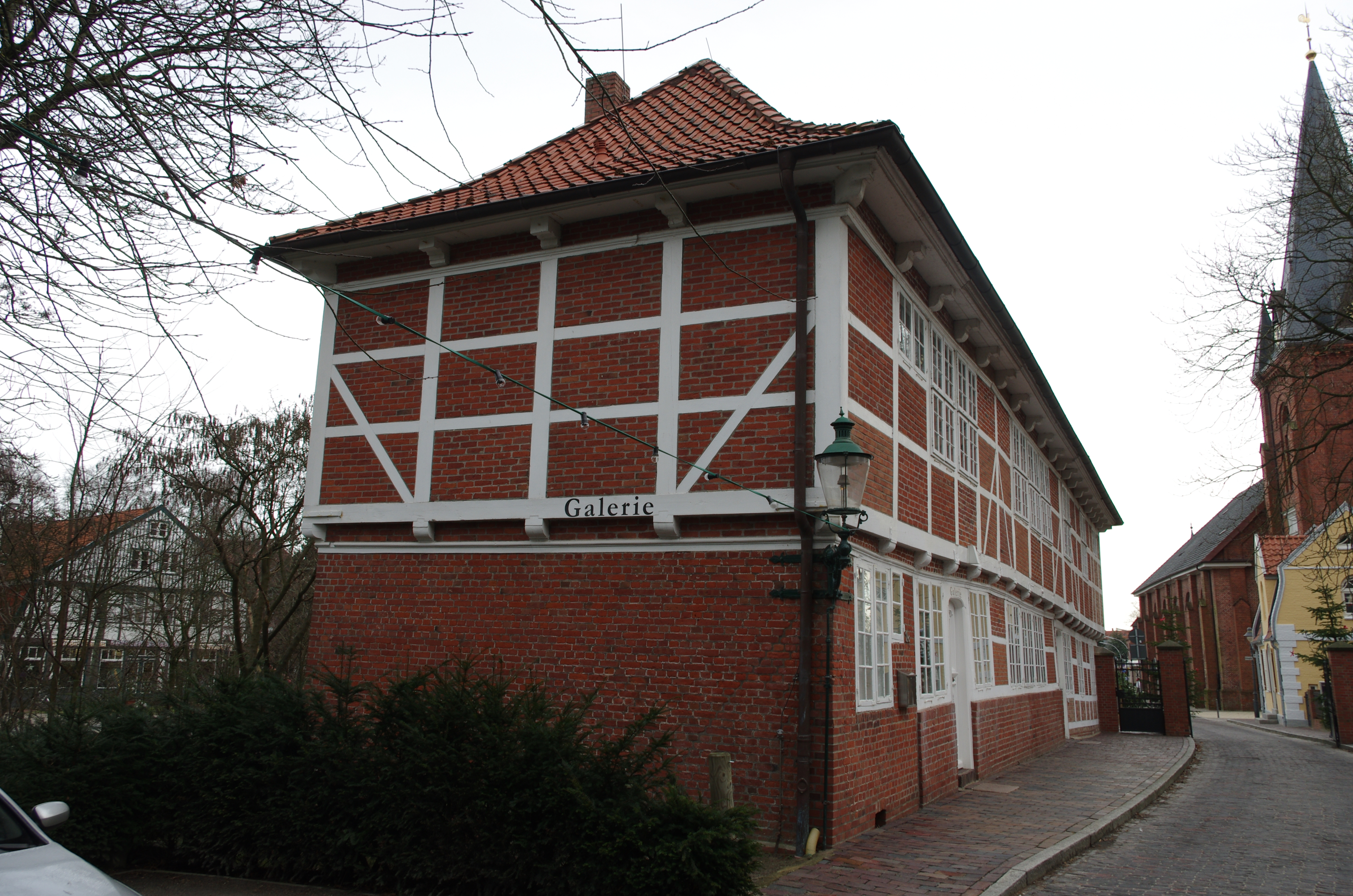 Cuxhaven in Niedersachsen. Das Wachhaus an der Südersteinstraße steht unter Denkmalschutz.